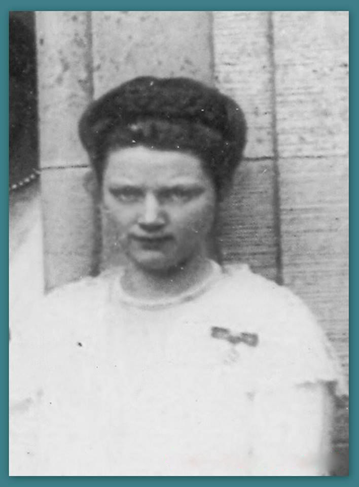 Imagen de Carlota (1934)